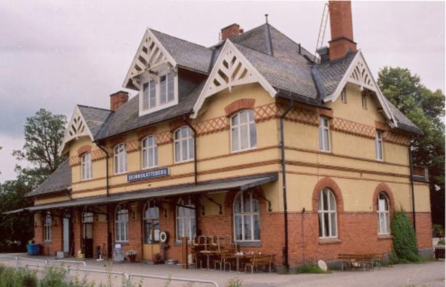 Stationshuset i Skinnskatteberg. Copyfree, eget fotoalbum.